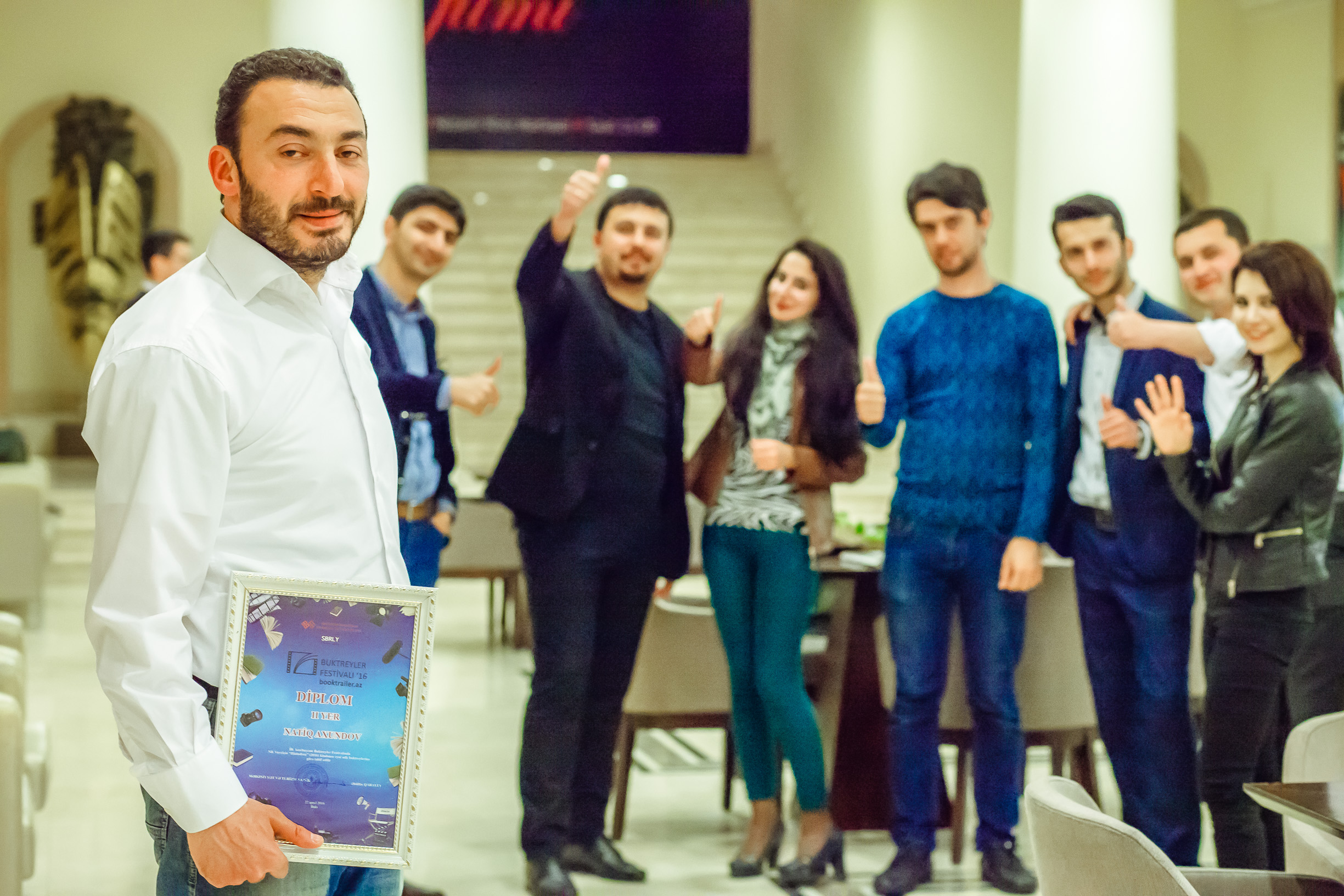 Natiq Axund "Hüdudsuz" buktreyler təqdimat